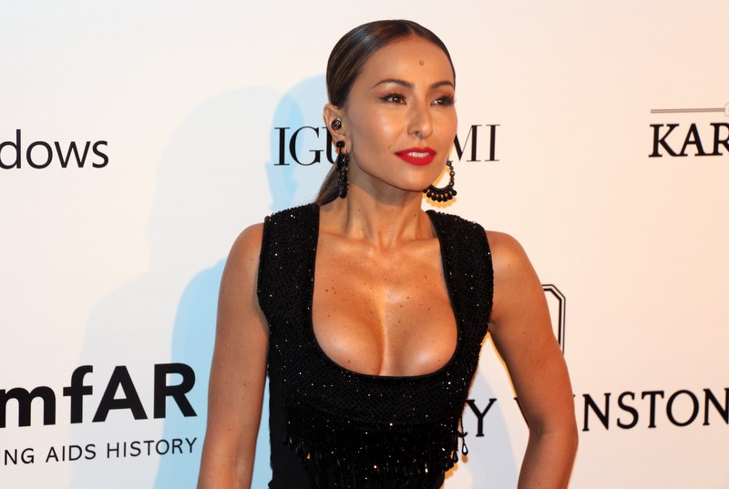 22 - Sabrina Sato-002